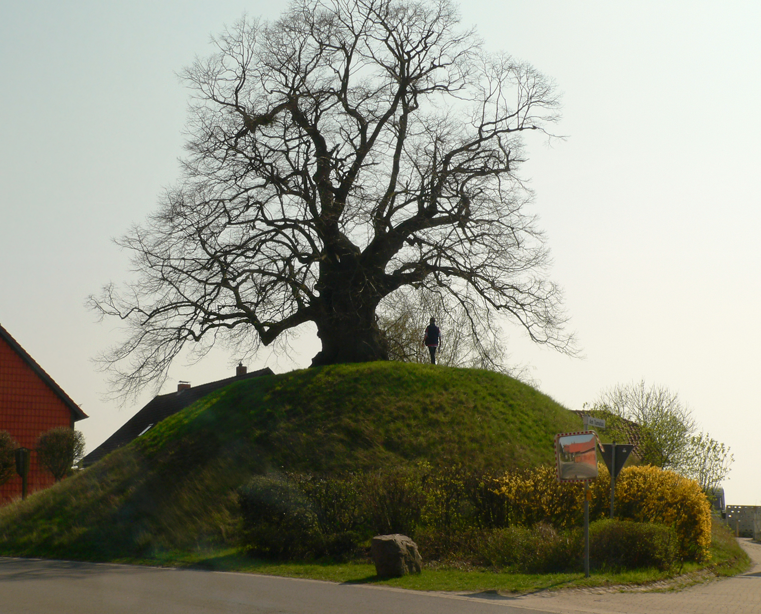 Tumulus von Evessen mit Person